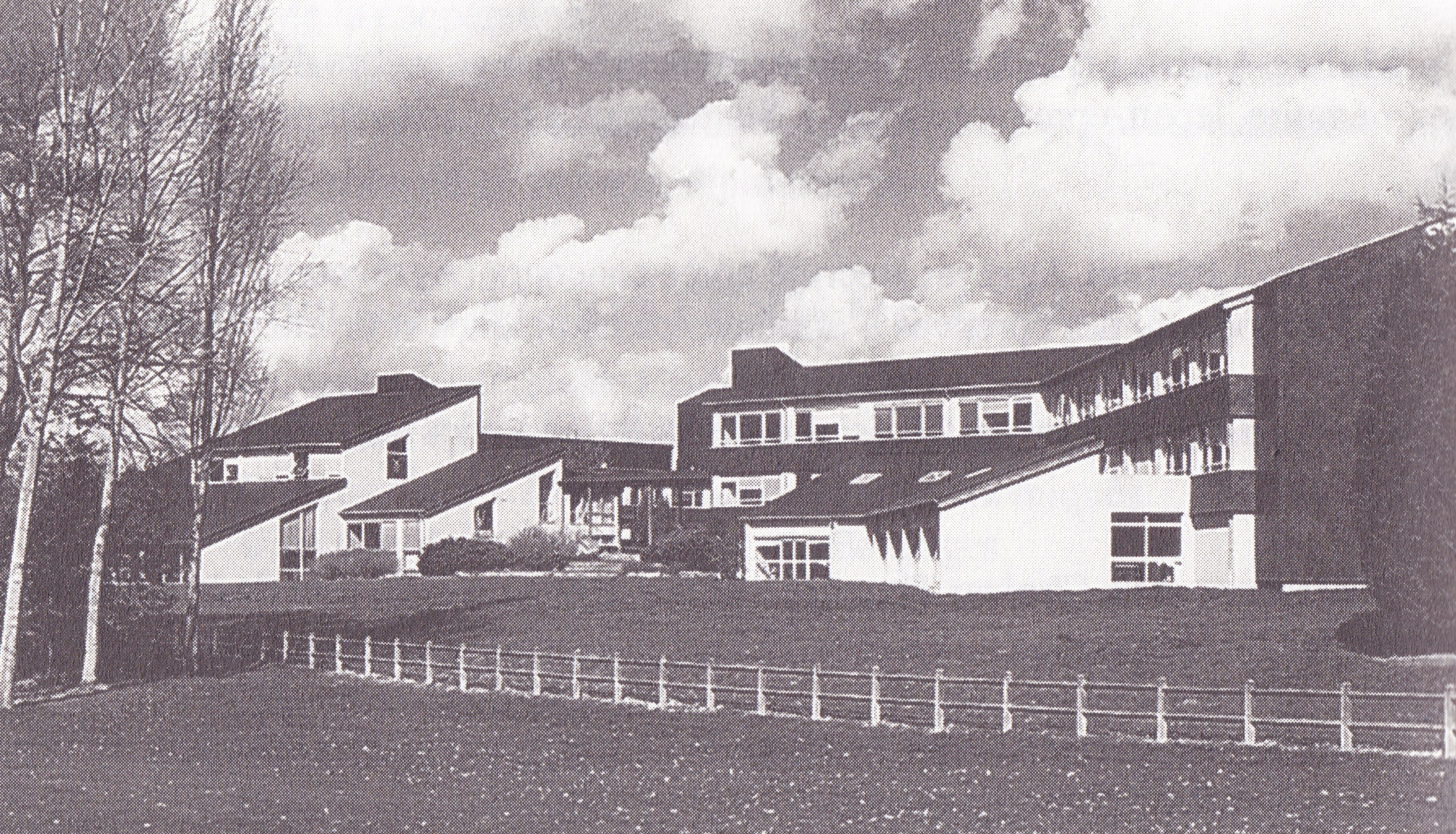 Côté ouest de l'ENVN vu depuis le parc de la Chantrerie en 1990